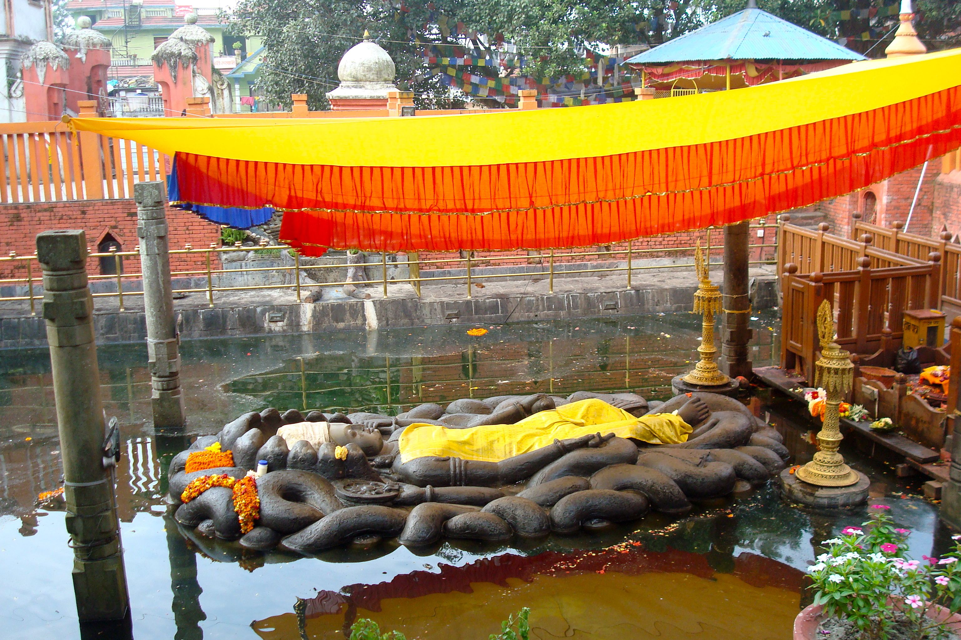 Vishnu of Budhanilkanha